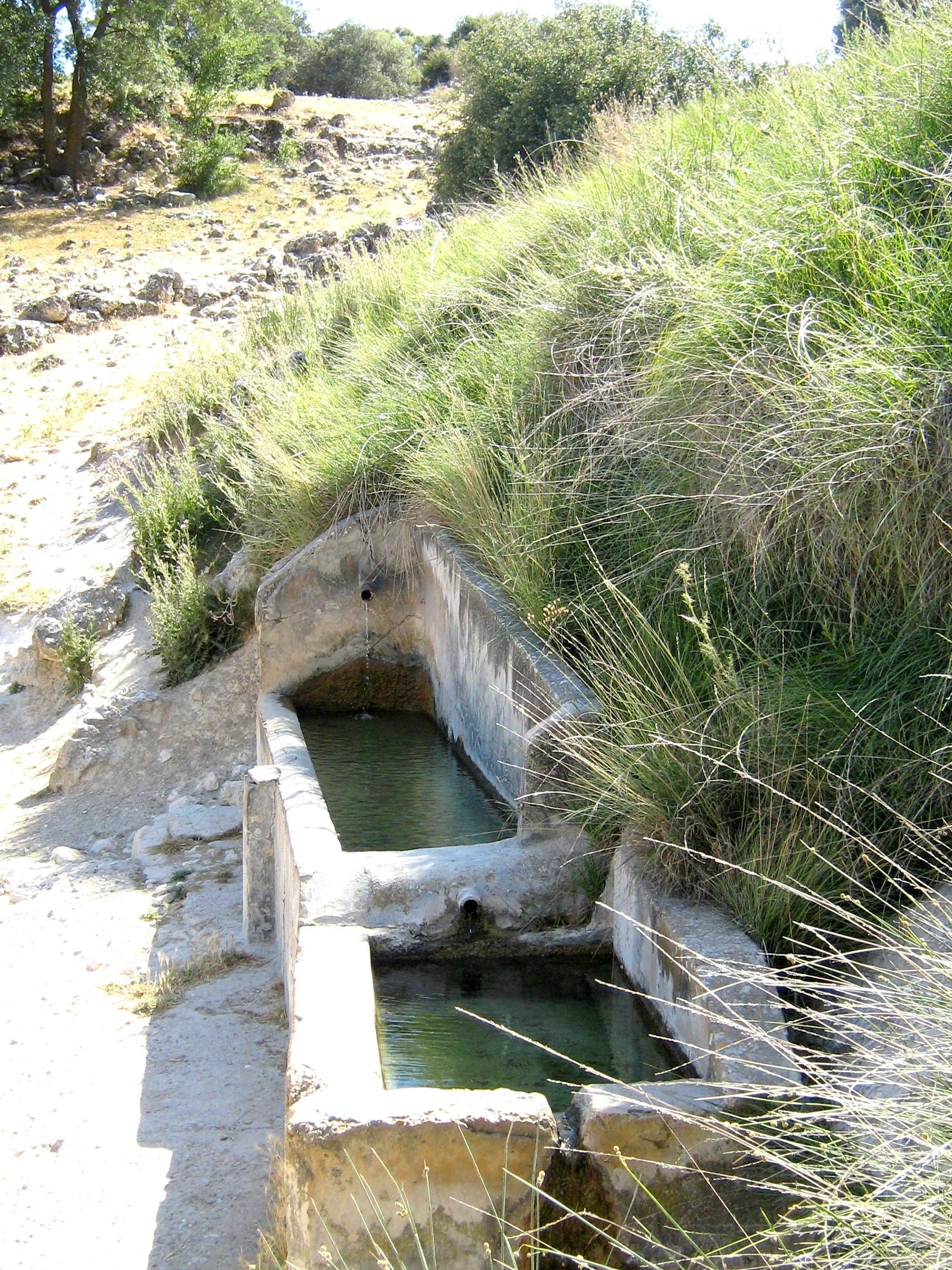 Corrales de Duero. Fuente de Honsequilla